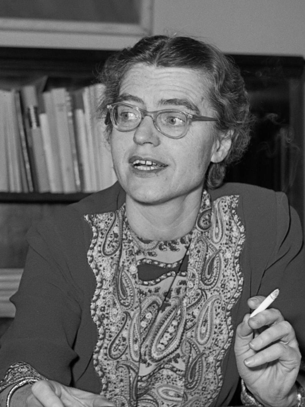 Minister Bodil Koch achter haar bureau op het ministerie maart 1954